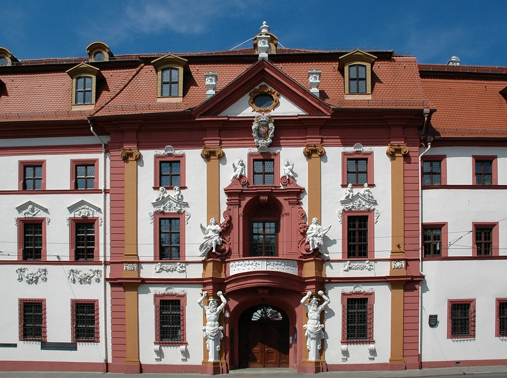 Mittelbau der Kurmainzischen Statthalterei (zwischen 1711 und 1720 errichtet), heute Thüringer Staatskanzlei in der Regierungsstraße in Erfurt